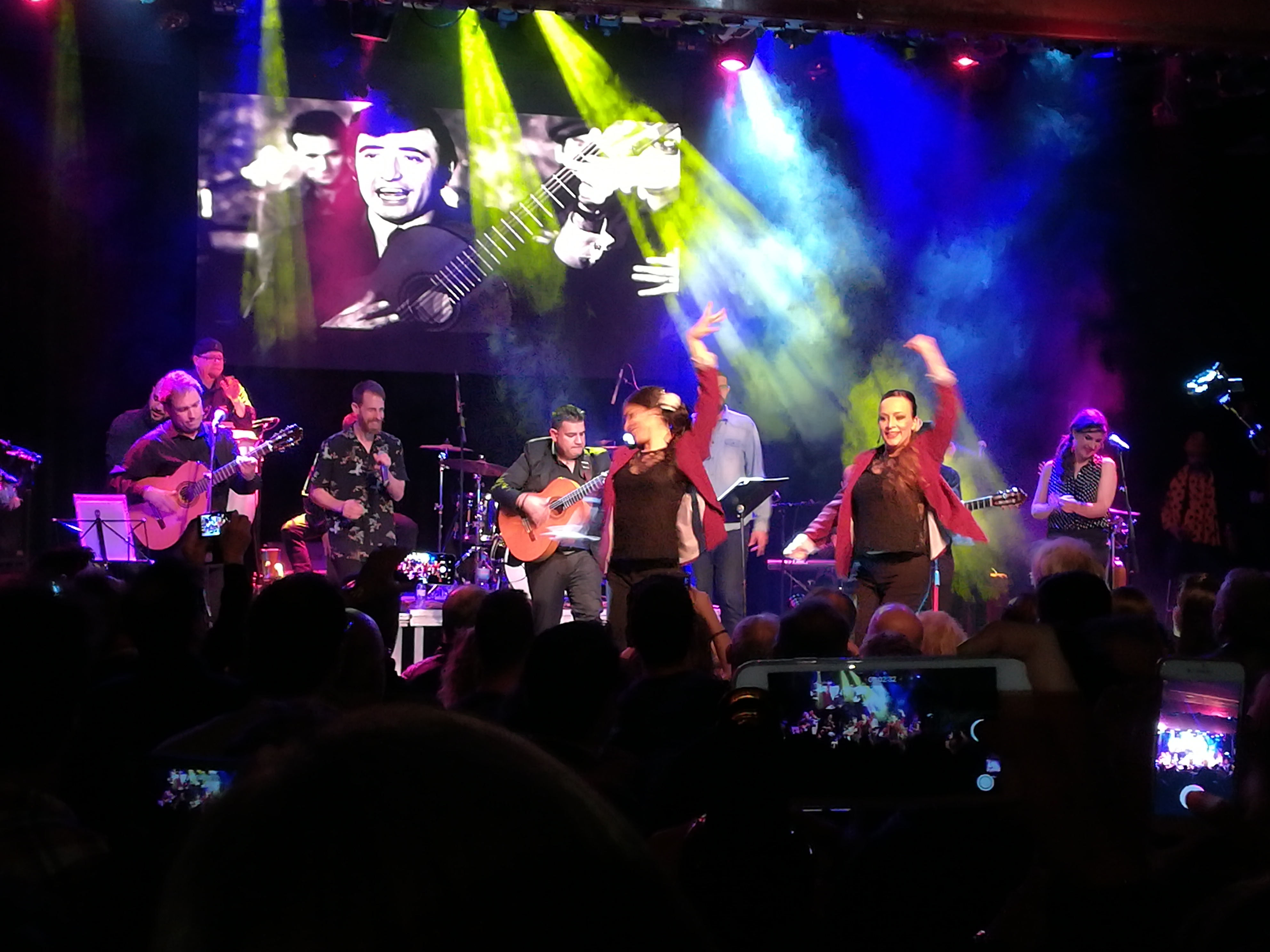 Sabor de Gràcia a la sala "Luz de Gas" de Barcelona el 15/3/2018, presentant el seu nou disc "Sabor a Peret", amb membres de La Pegatina i les ballarines Montse Selma i Mar Bachs